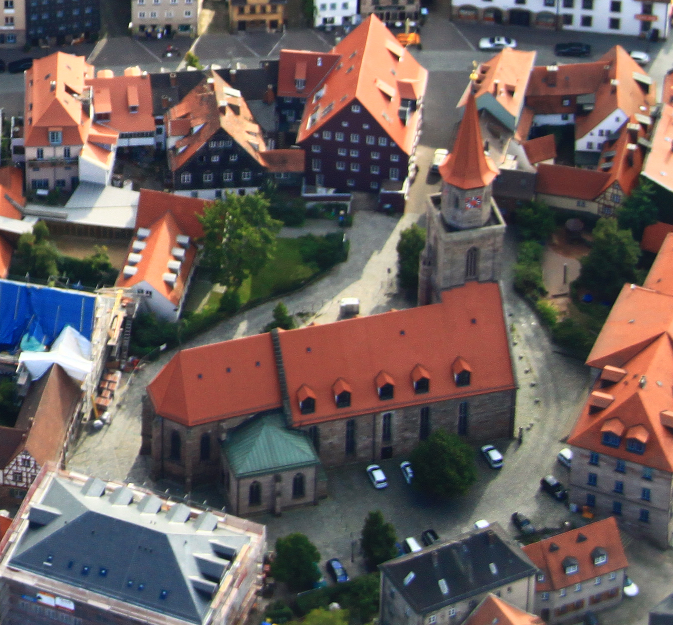 Stadtpfarrkirche Sankt Michael am Kirchenplatz 4 in der Fürther Altstadt (Nordseite)